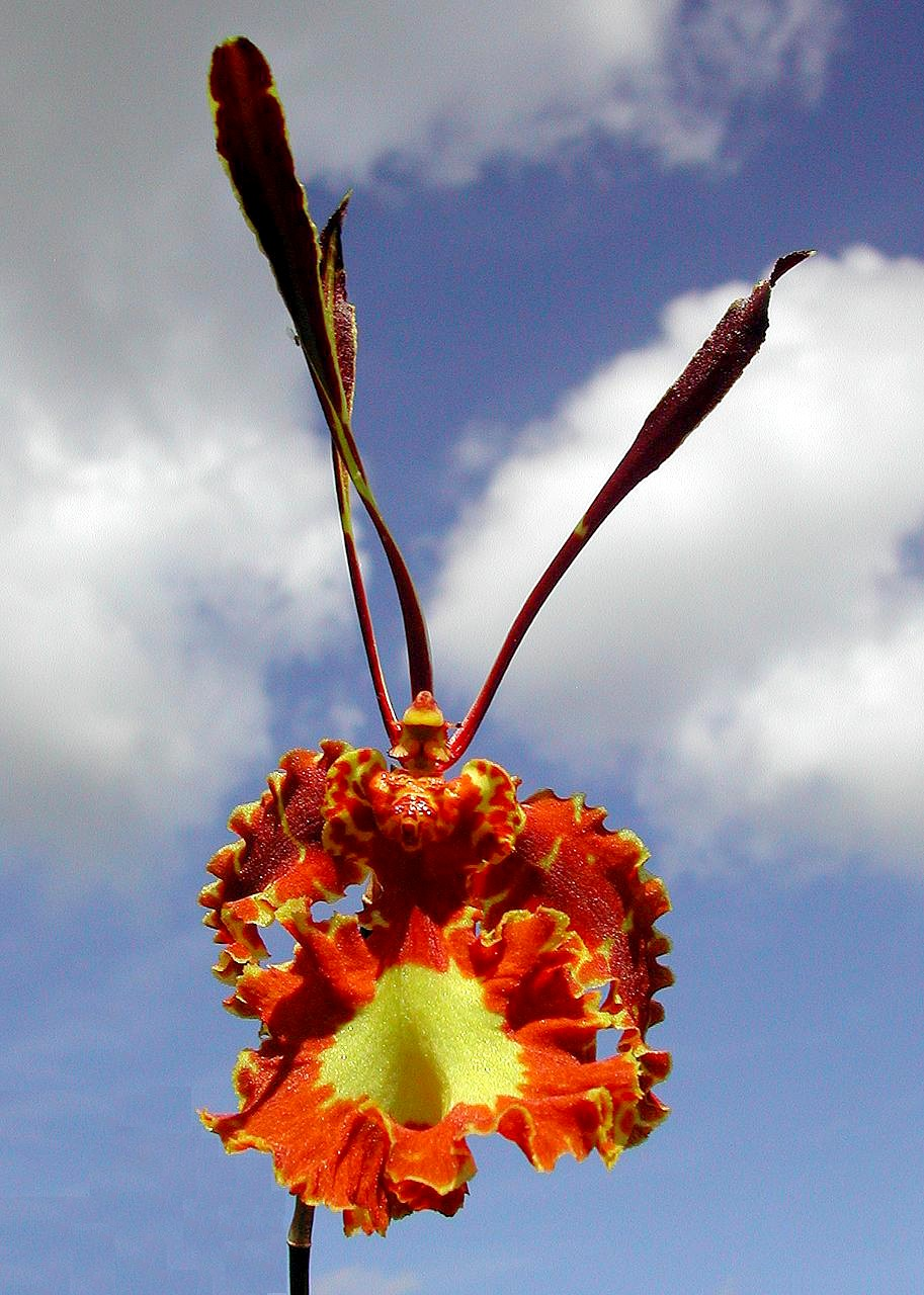 Psychopsis papilio